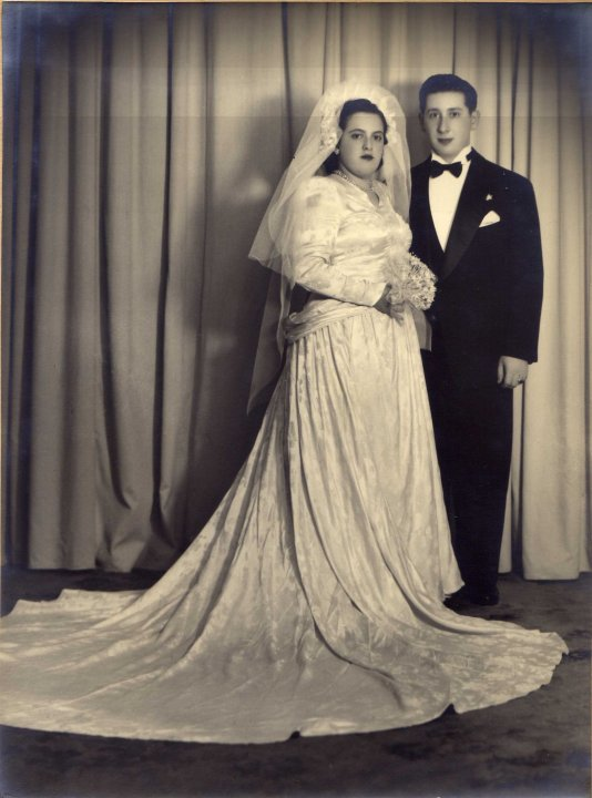 Mario Abramovich, el dia de su casamiento, año 1949